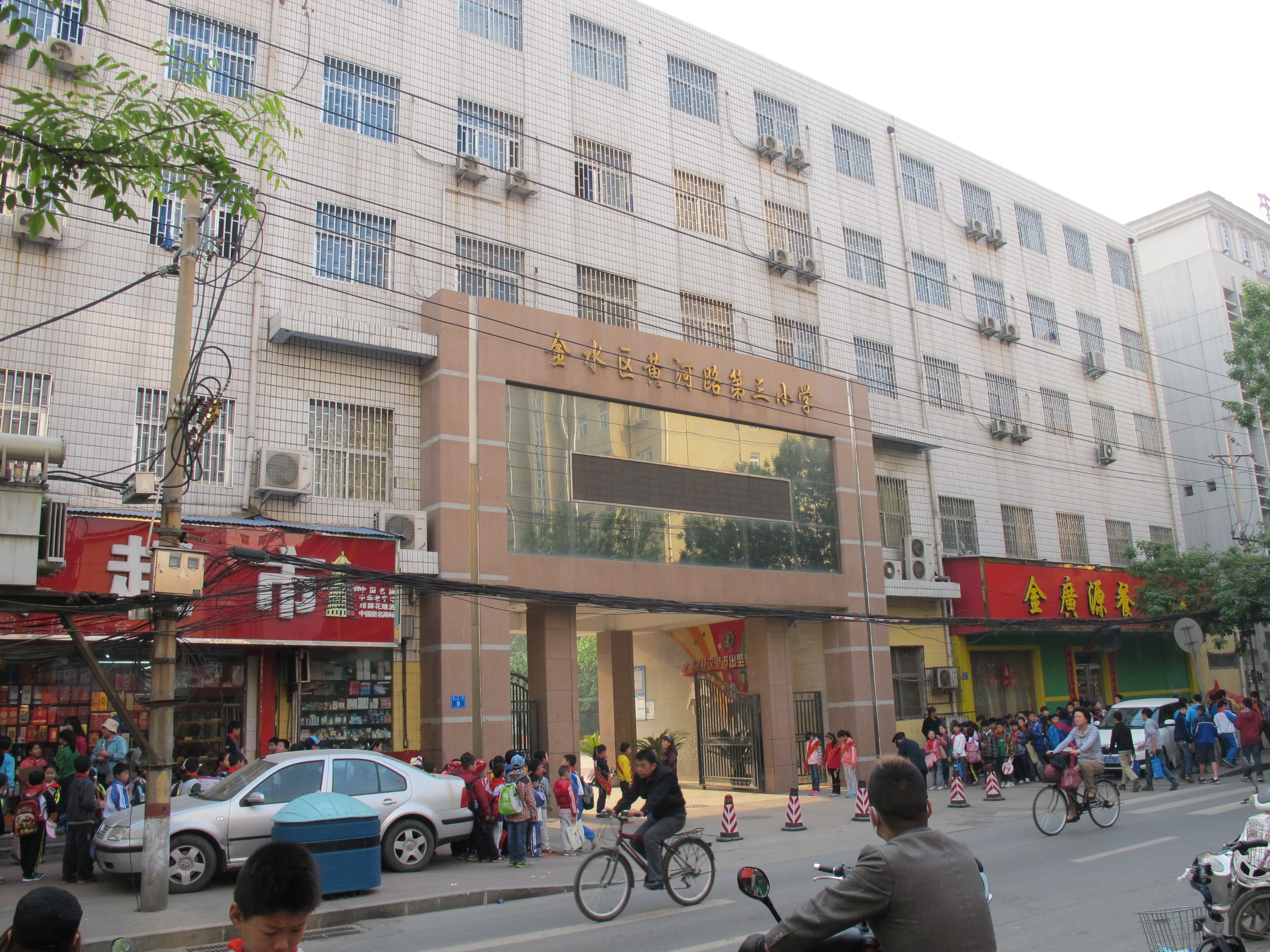 郑州金水区黄河路第三小学